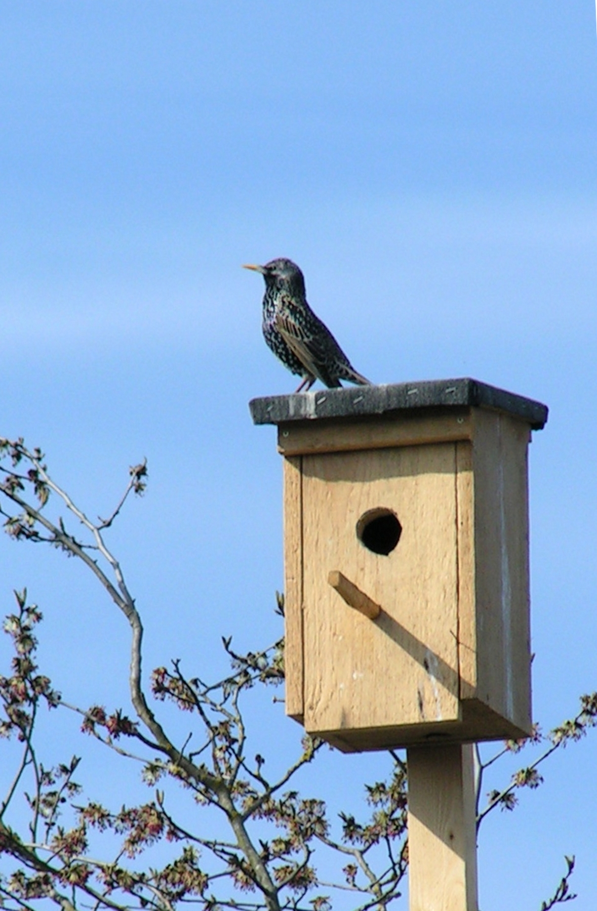 Star, posierend auf seinem Starenkasten